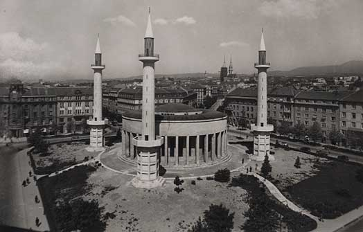 Džamija u Zagrebu tijekom Drugog svjetskog rata, današnji Meštrovićev paviljon, Trg žrtava fašizma